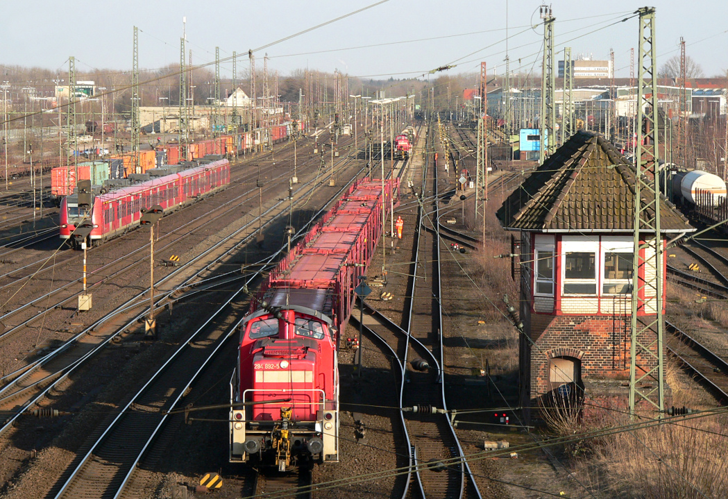 Gleise des Bahnhof Linden Fischerhof